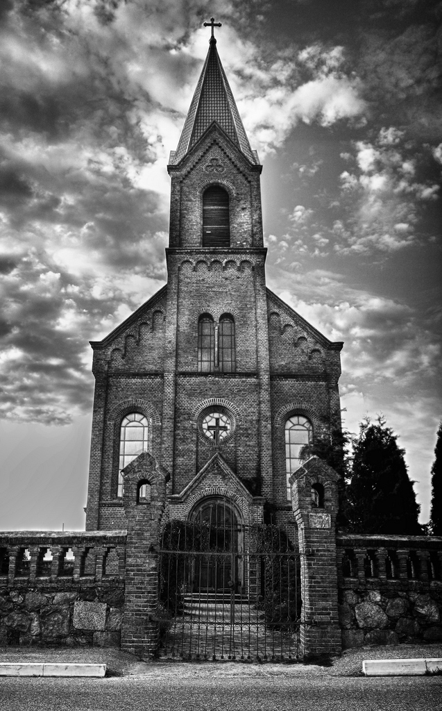 Беларуская (тарашкевіца): Касьцёл у вёсцы Опса на Браслаўшчыне пабудаваны ў пачатку 20 стагодзьдзя. This is a photo of Belarusian heritage monument. Reference number: 213Г000207 ( WLM)